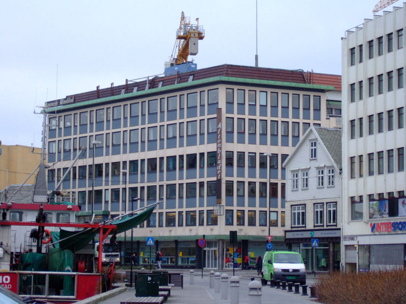 Building Stavanger Aftenblad